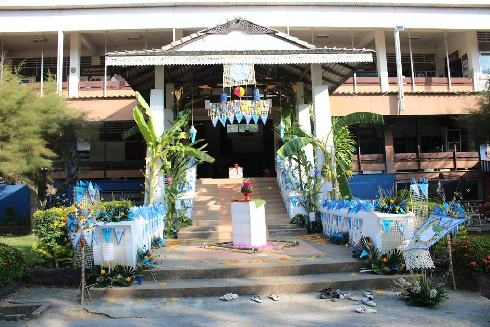 งานประเพณียี่เป็ง(ลอยกระทง) โรงเรียนสันป่าตองวิทยาคม